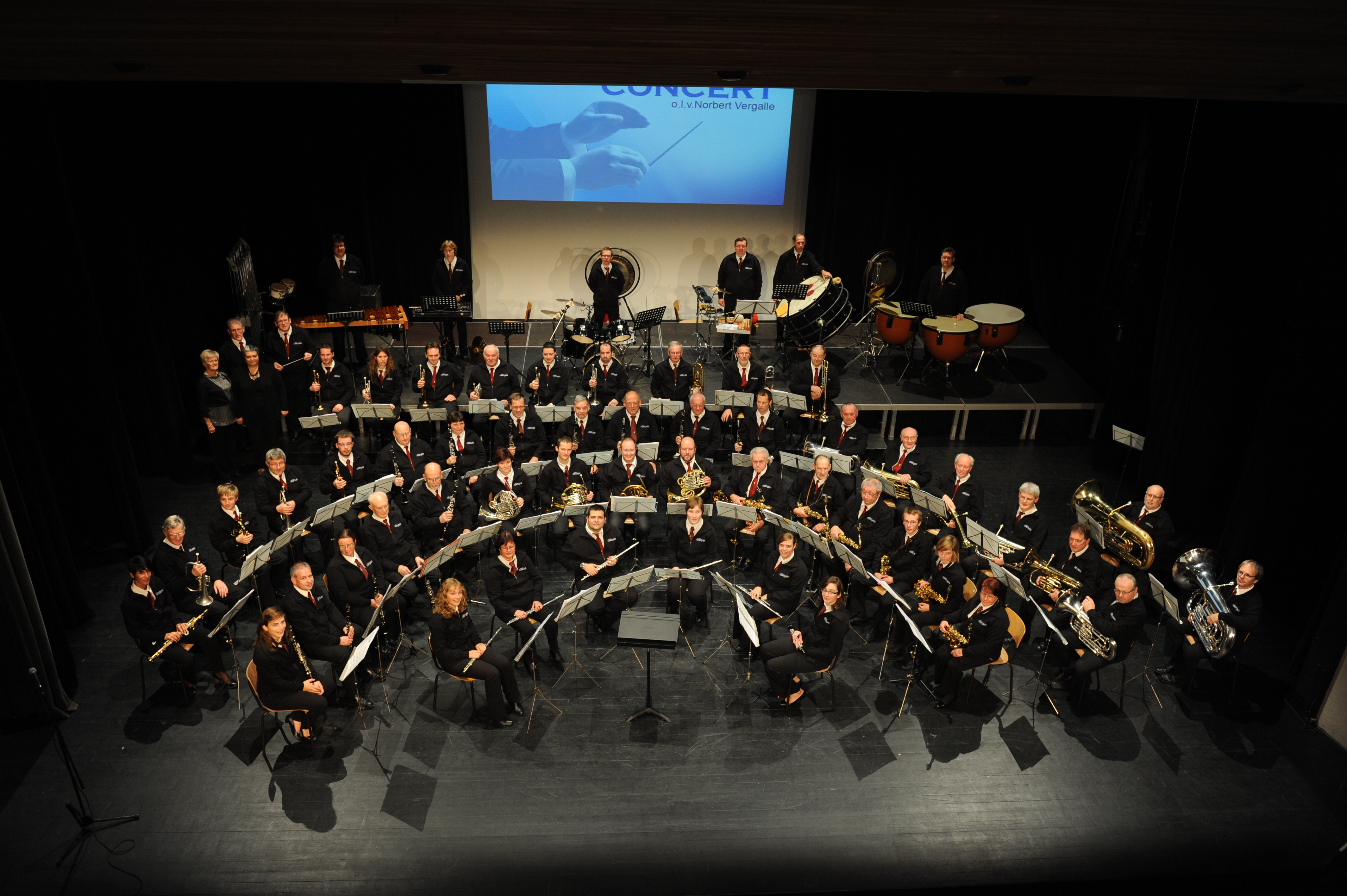 Het Wevelgems Harmonieorkest Concordia - zondag 27/11/2011 - Najaarsconcert